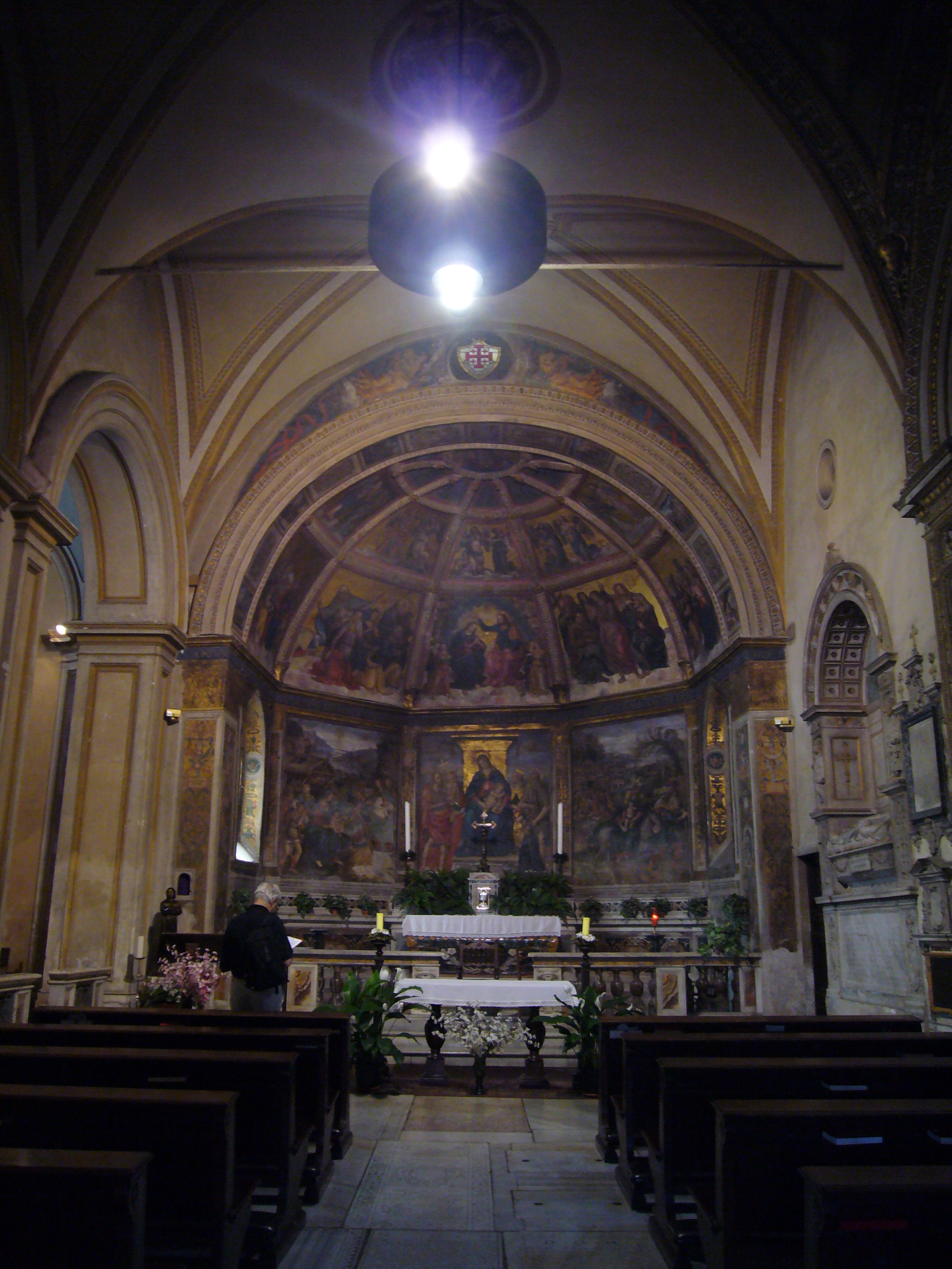 Roma, sant'Onofrio: interno